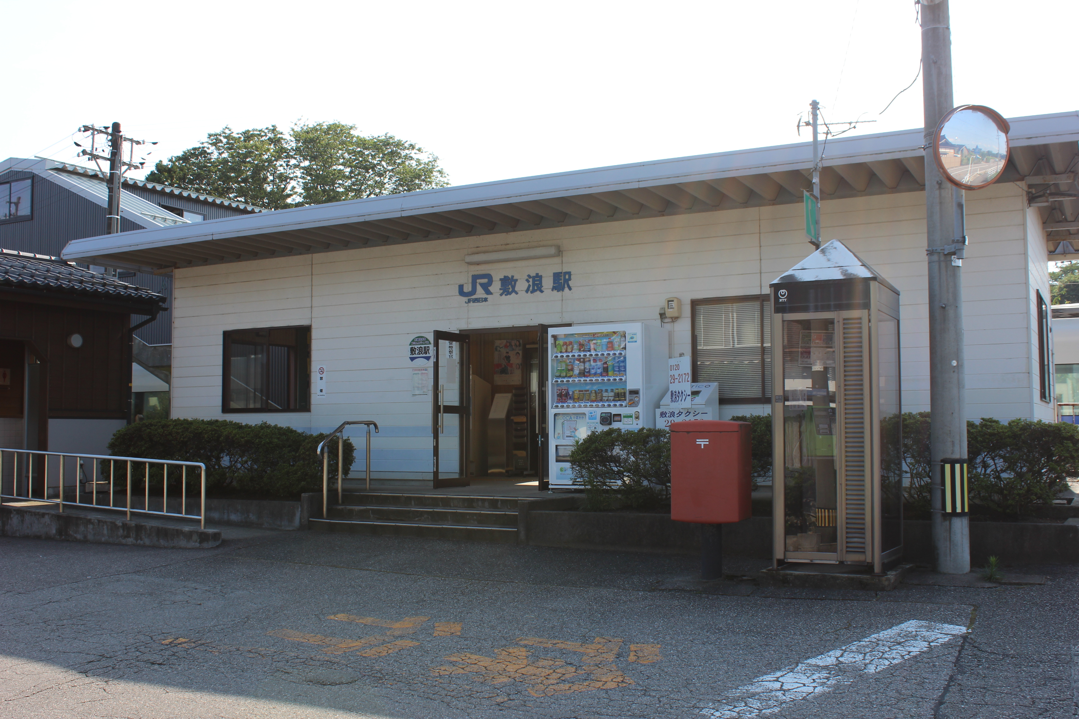 敷浪駅（石川県羽咋郡宝達志水町） Canon EOS Kiss X5